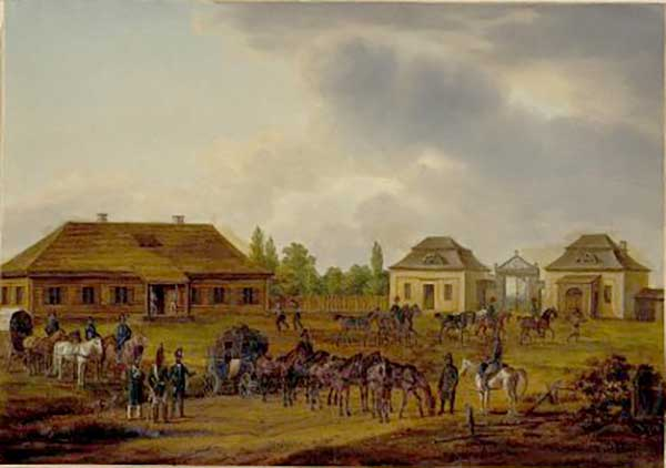 Беларуская (тарашкевіца): Пышна (Pyšna), сядзіба Сяляваў (Sialava)